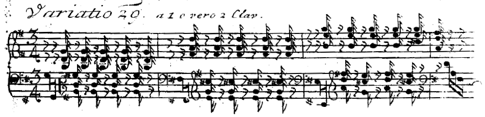 Beginn der 29. Variation aus den "Goldberg-Variationen".